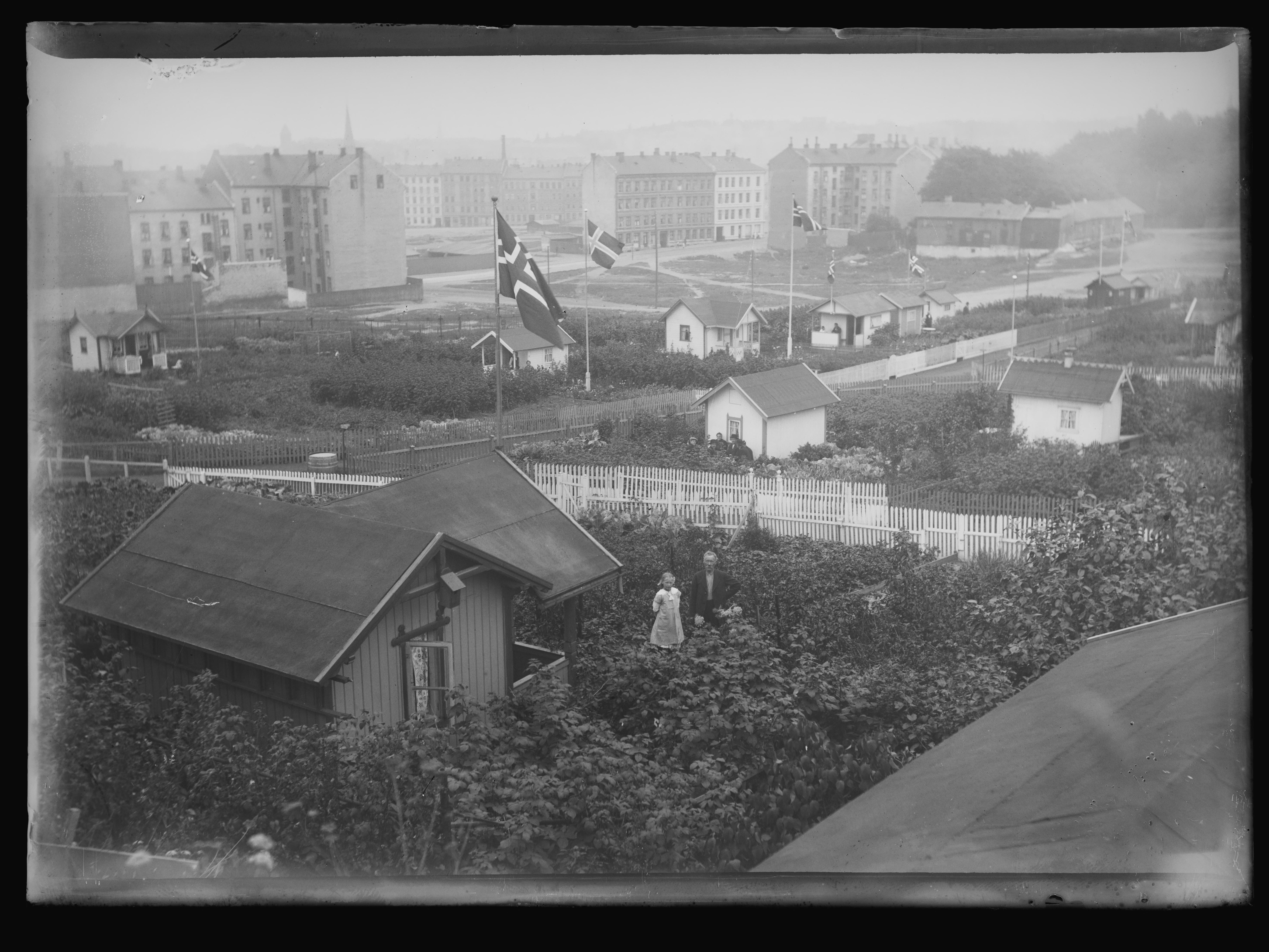 Bildet er hentet fra Nasjonalbibliotekets bildesamling. Anmerkninger til bildet var: Påskrift arkivark: Rodeløkkens Smaahaver Arkivnummer: 202 Rodeløkka,Rodeløkka kolonihager, Oslo, Oslo